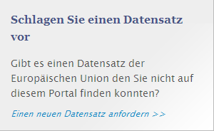 DE_box